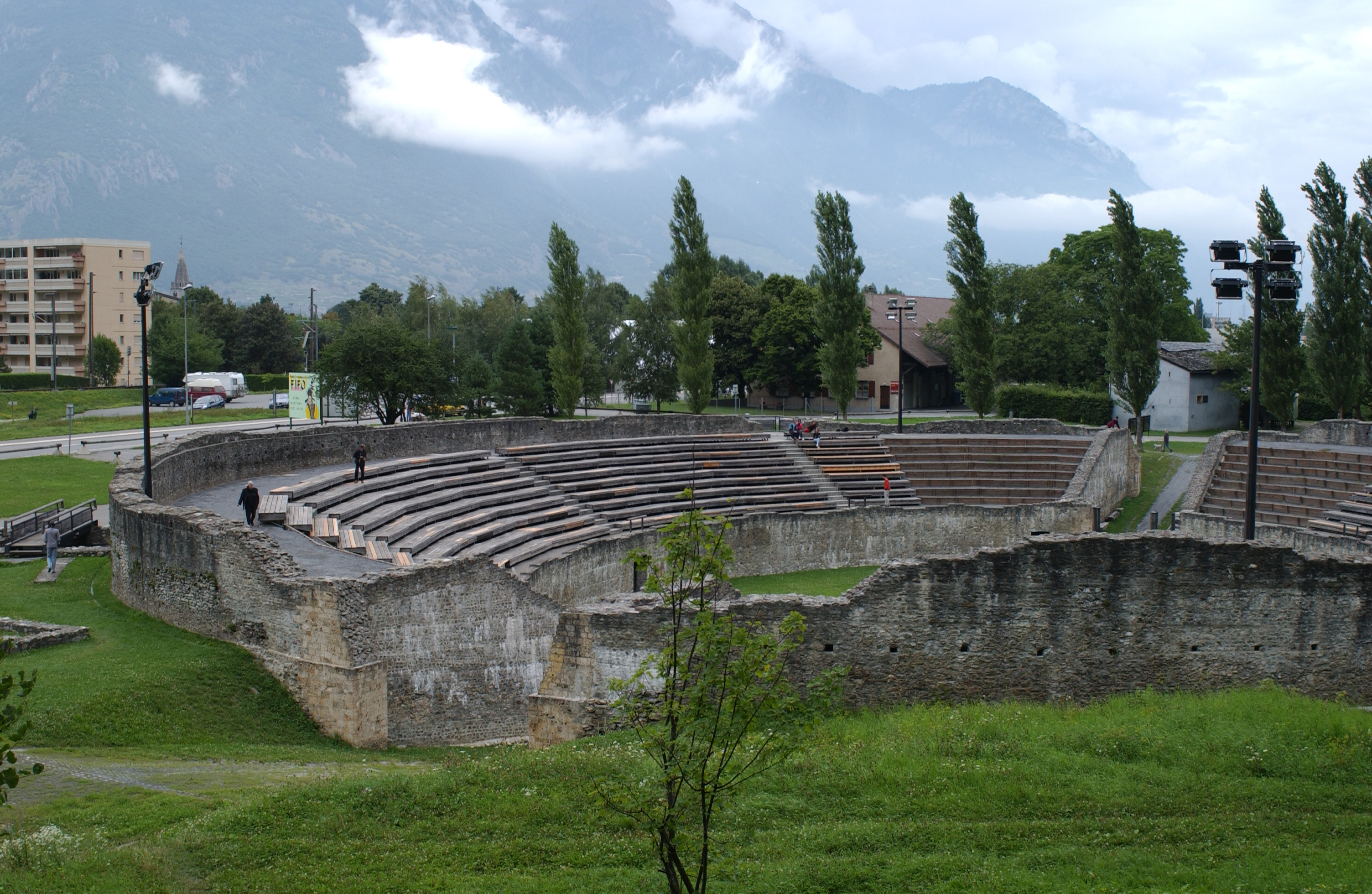 Martigny : l'amphithéâtre romain.